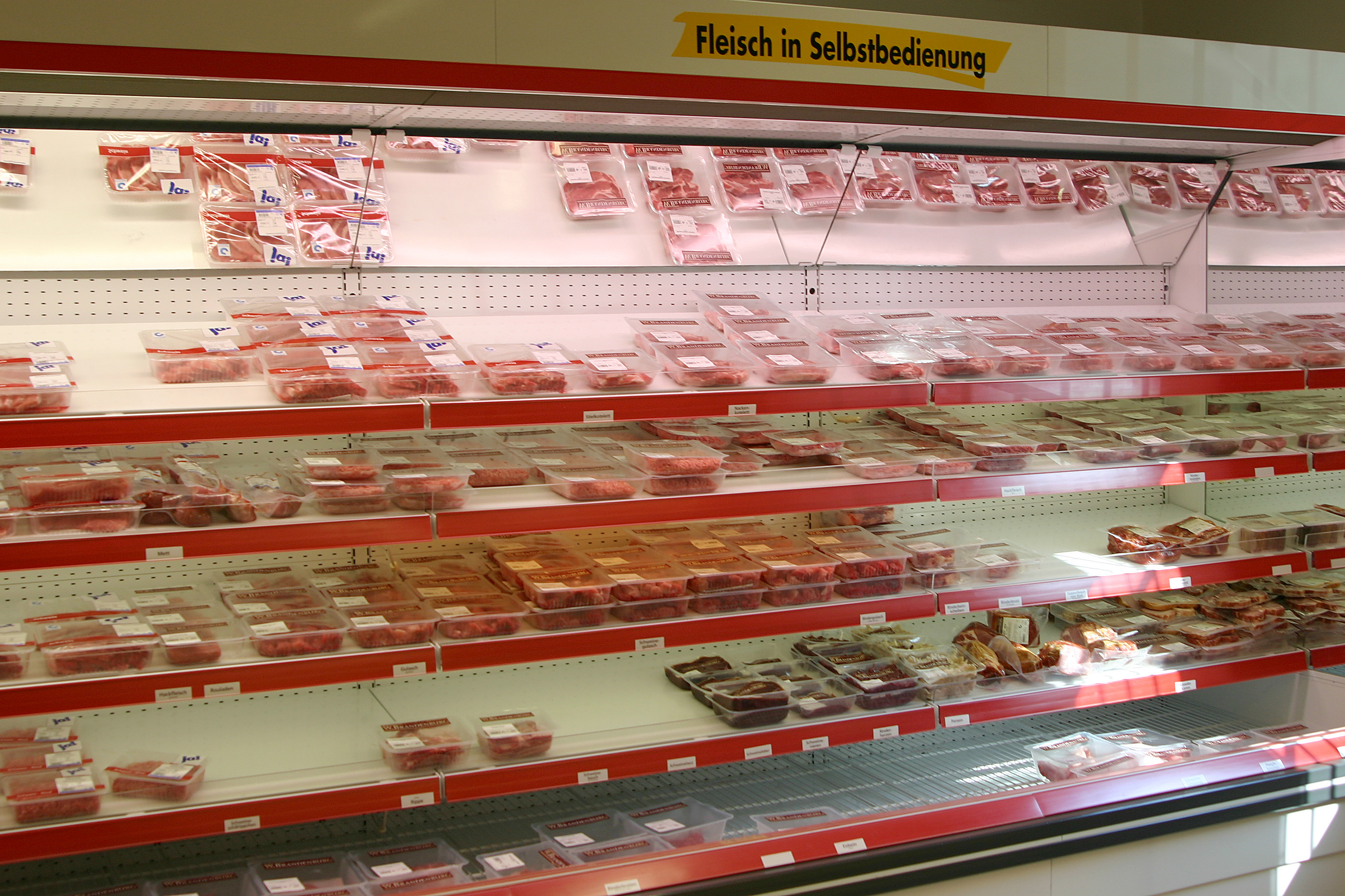 Bilder im Supermarkt REWE